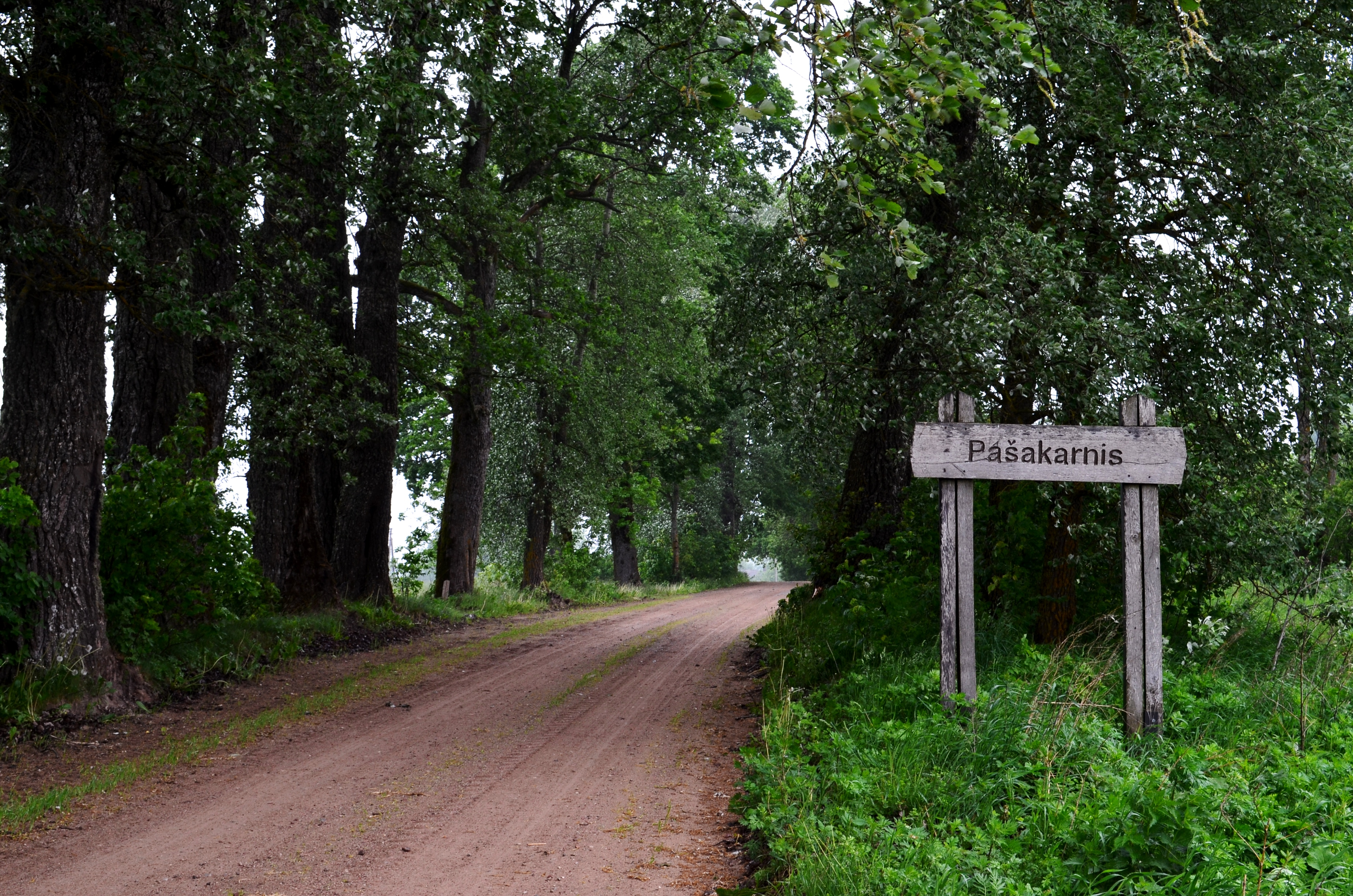 Pašakarnis, Kelmės r.